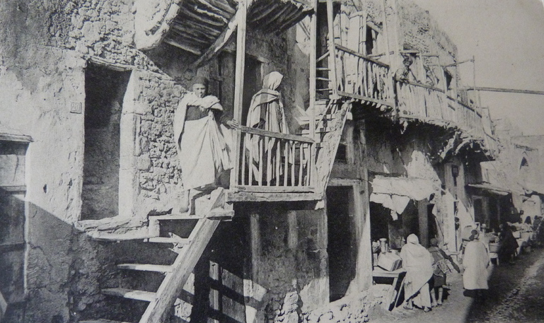 Vue de Souk El Haddadine dans une carte postale datant du 20ème siècle